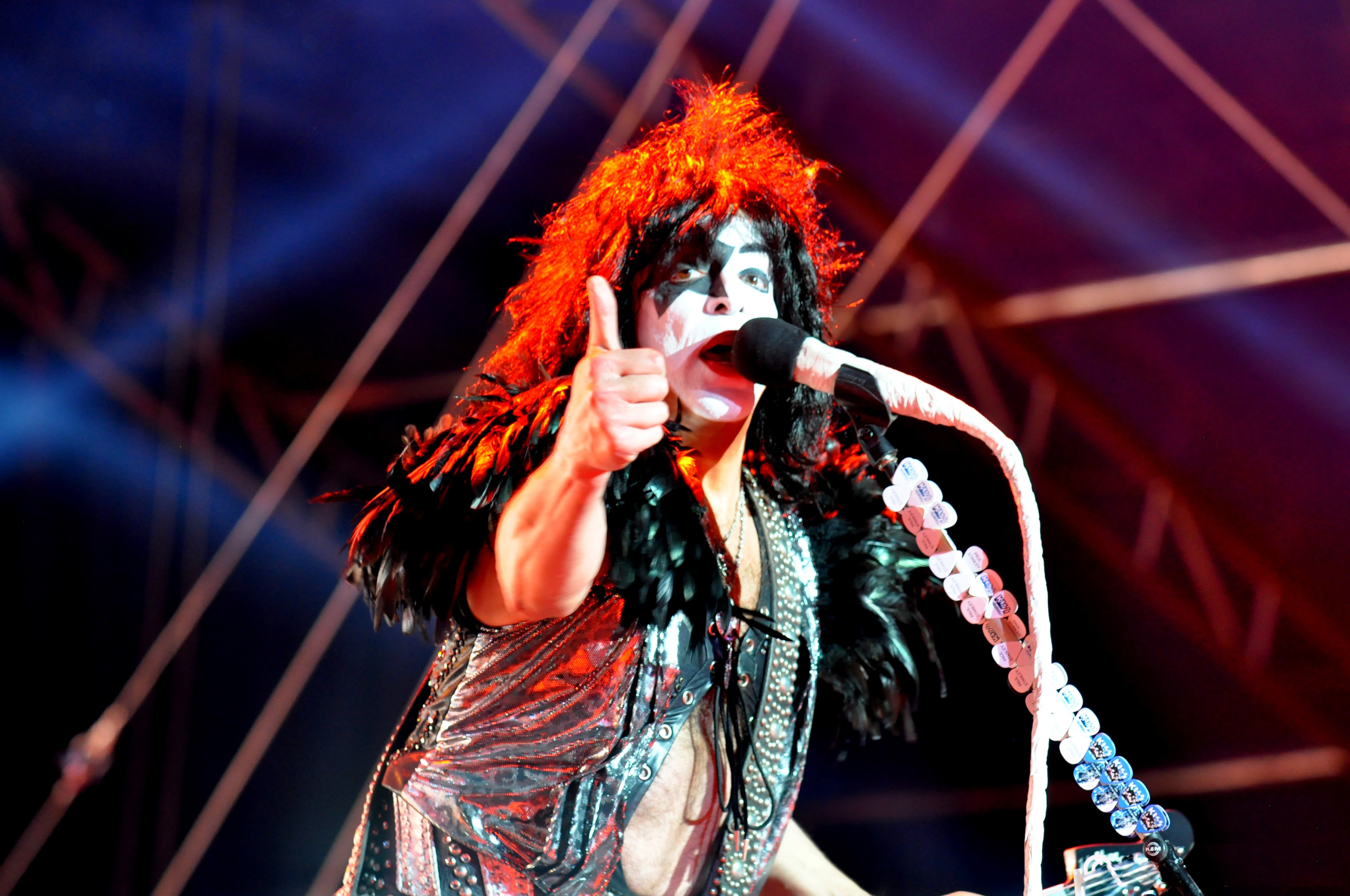 KISS -DSC_1486- 8.29.12